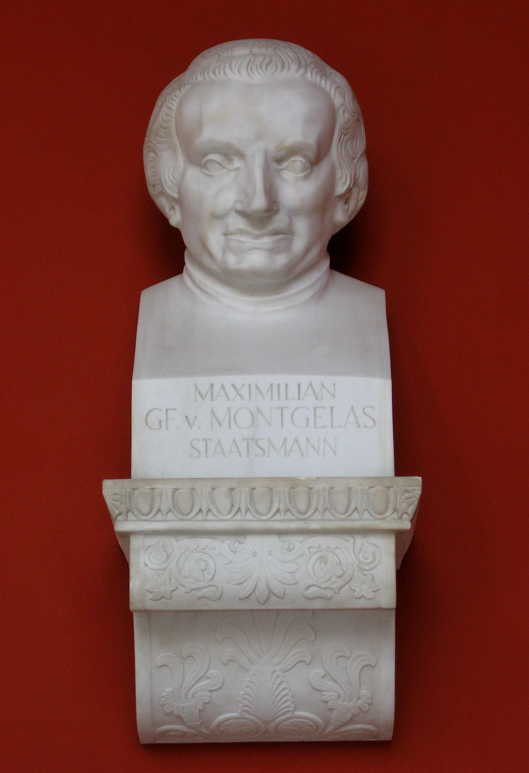 Theresienhöhe 16; Ruhmeshalle, dreiflügelige, dorische Ruhmeshalle mit Büsten verdienter Bayern, 1843–53 von Leo von Klenze. Maximilian Gf. v. Montgelas, Staatsmann